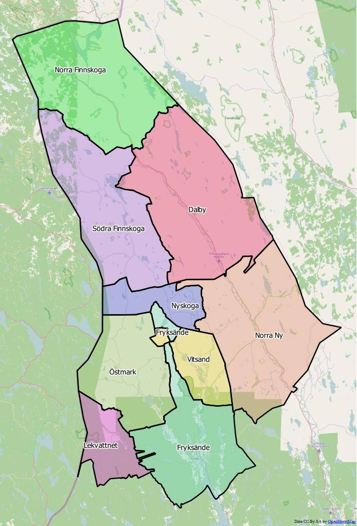 Distriktsindelningen i Torsby kommun World file: 243.30607335203174557 0 0 -243.30607335203174557 1354947.54242453700862825 8647435.7711368016898632